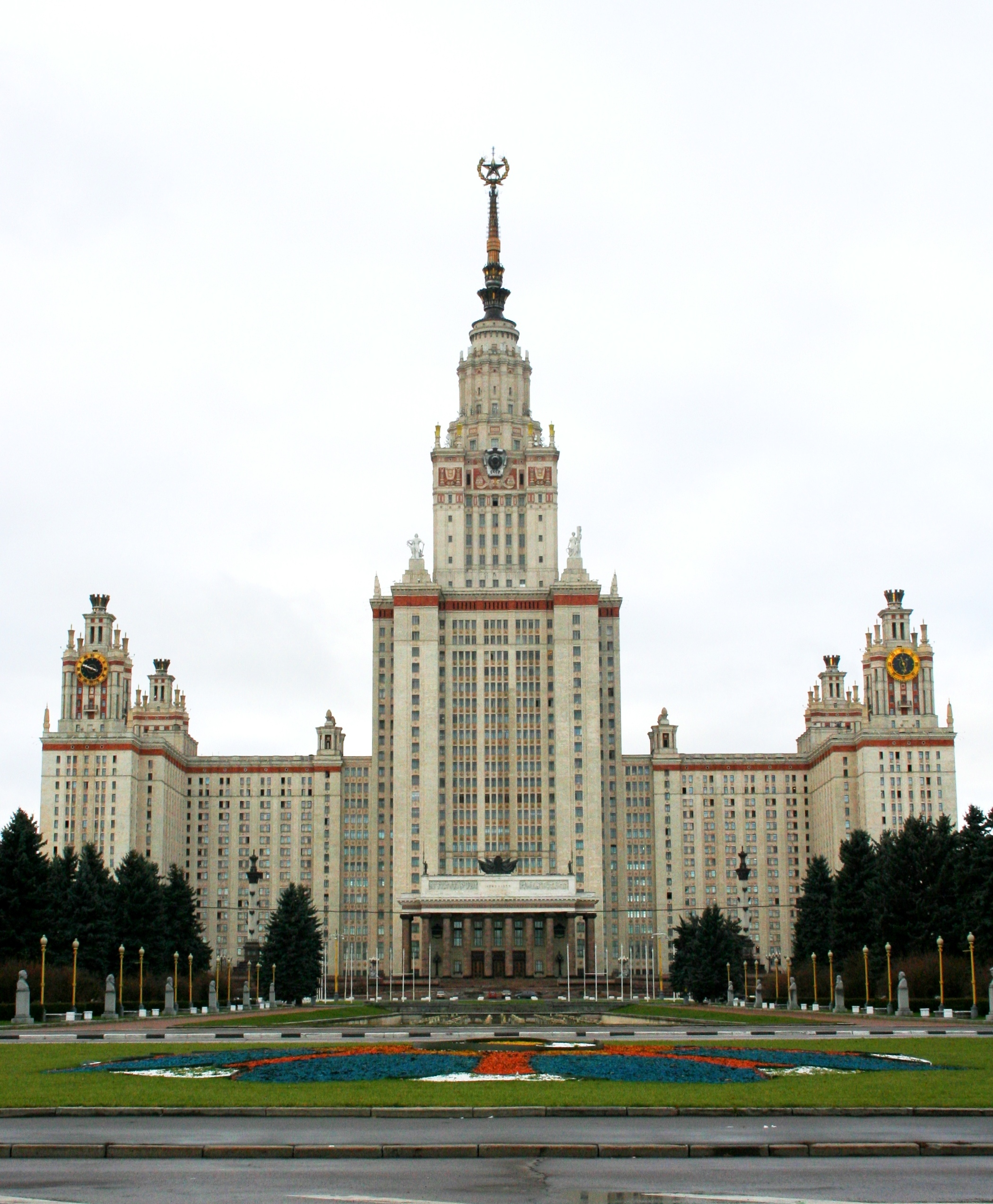 МГУ